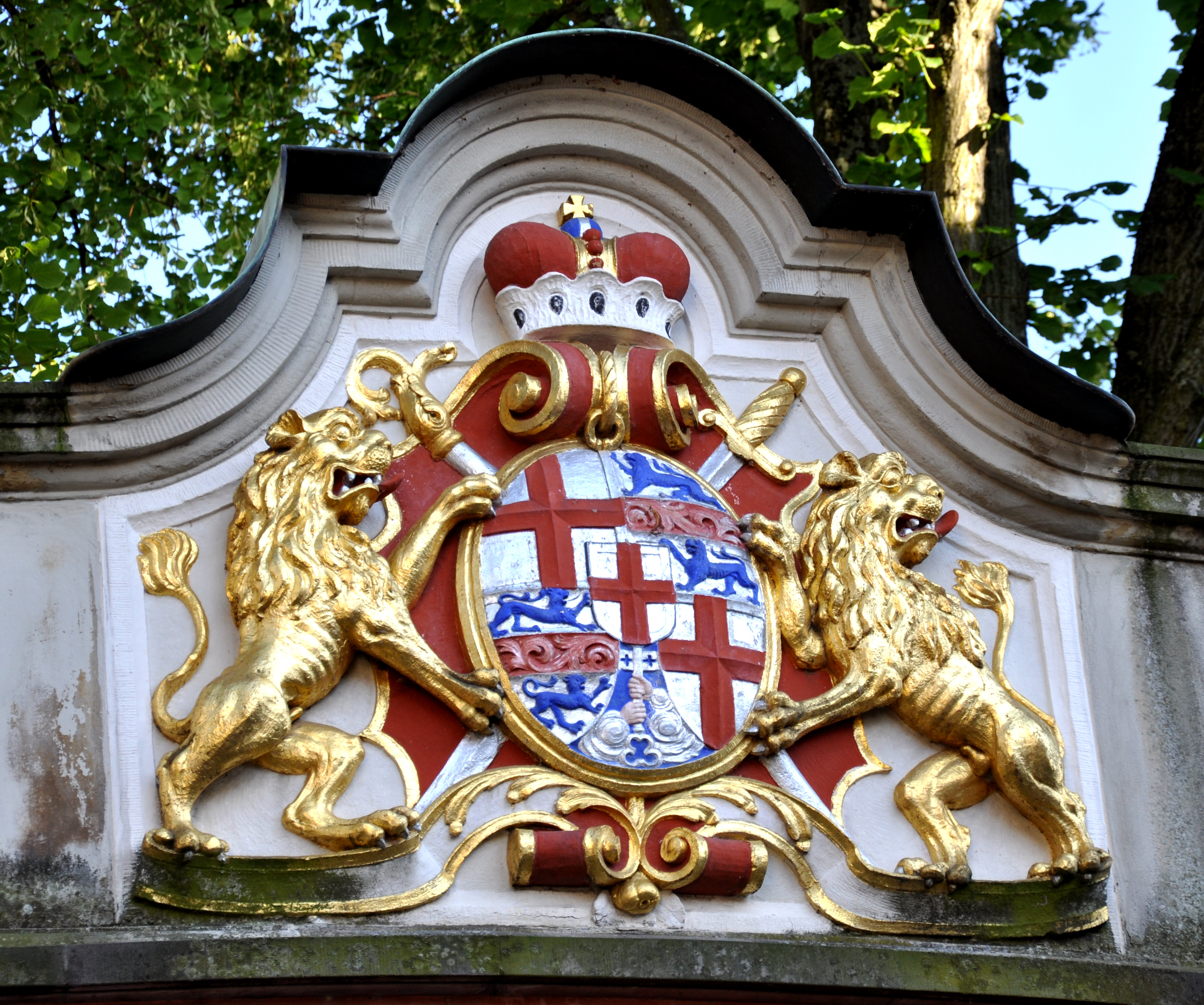 Meersburg, Neues Schloss, Aufgang zur Terrasse, Wappen des Bischofs Johann Franz Schenk von Stauffenberg